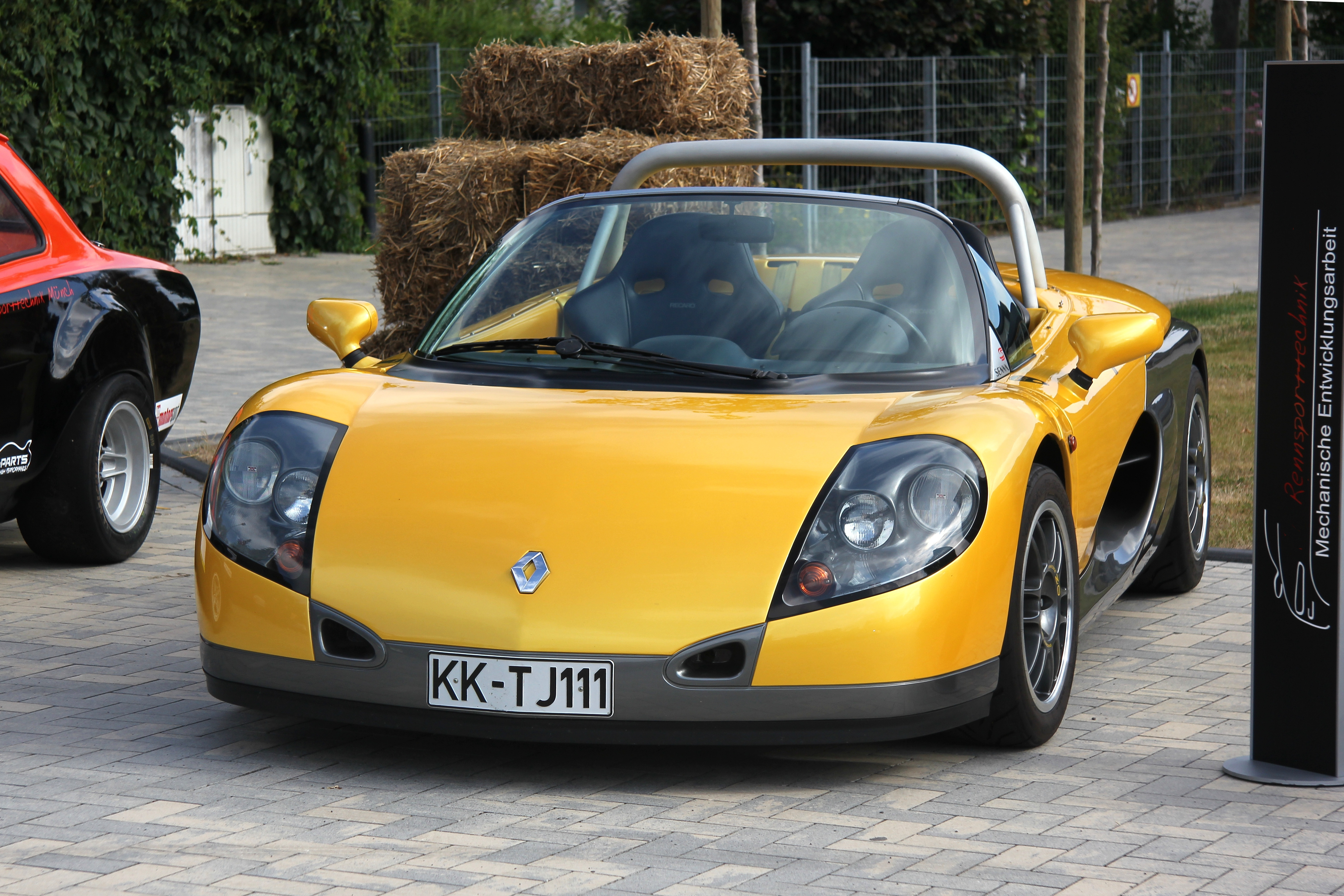 Renault Sport Spider, gebaut von 1995 bis 1999; Kennzeichen verändert